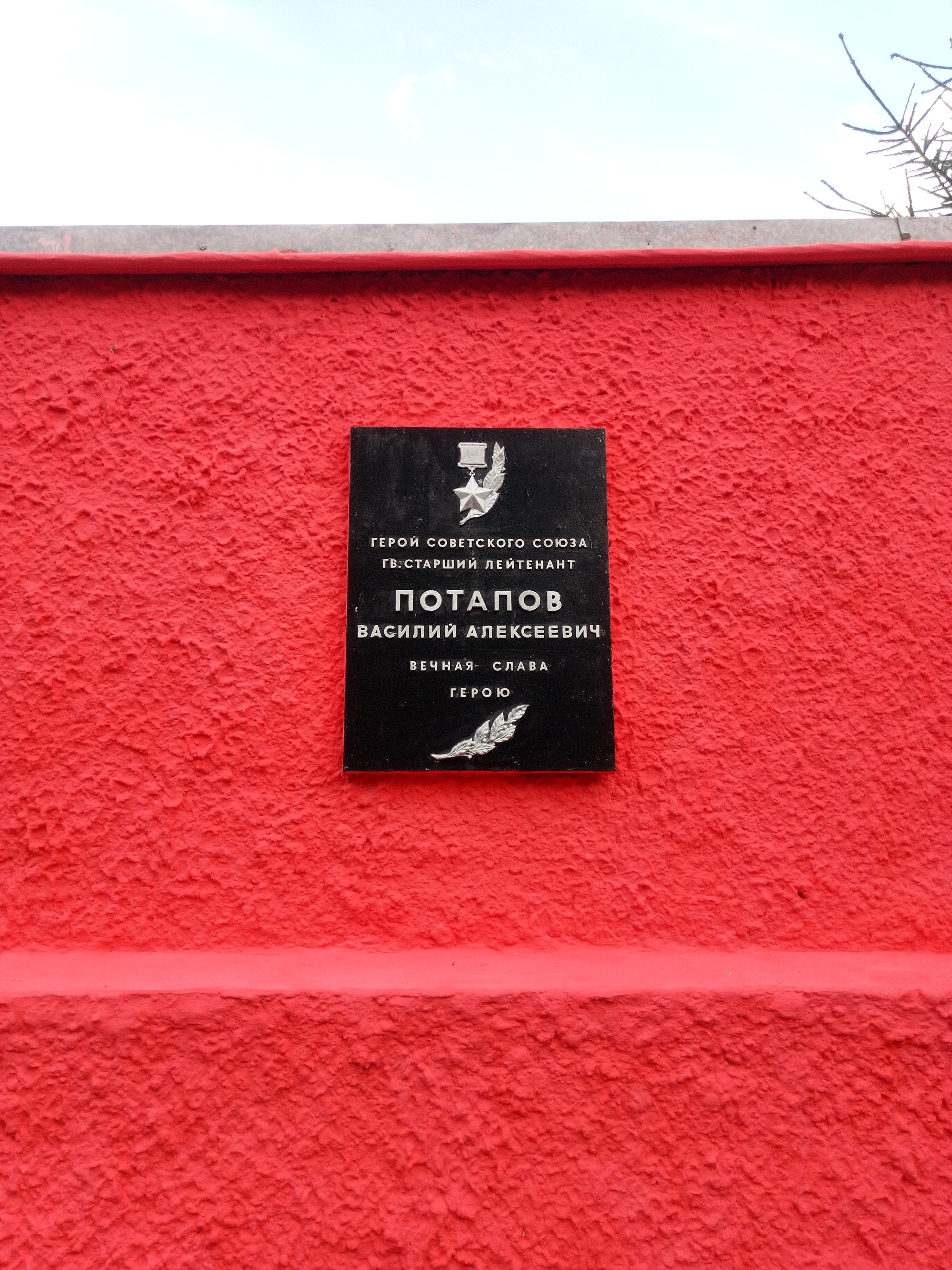 Мар’іна Горка. Мемарыял 8-ай танкавай дывізіі